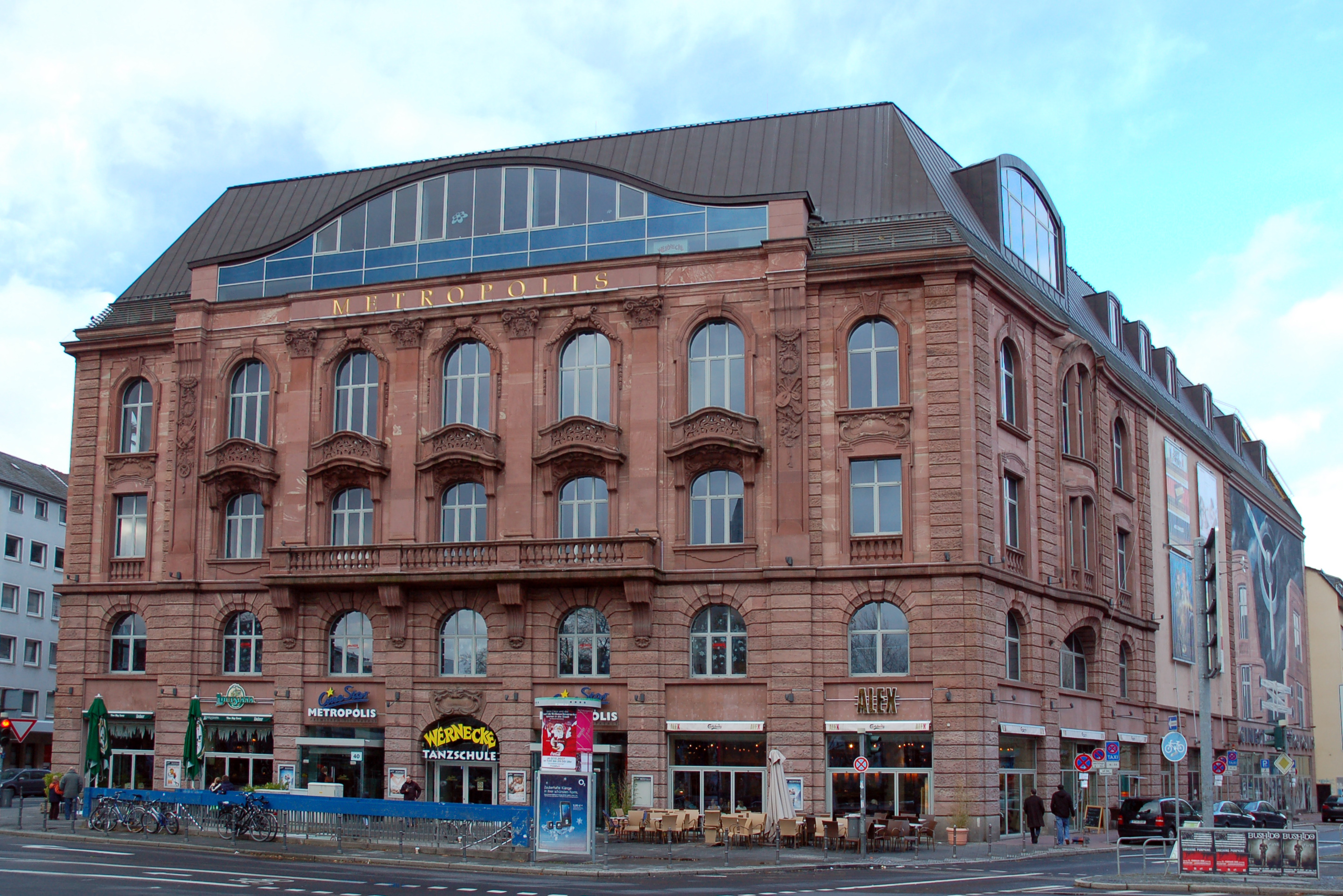 Cinestar Metropolis, ehemaliges Volksbildungsheim in Frankfurt am Main am Eschenheimer Tor.